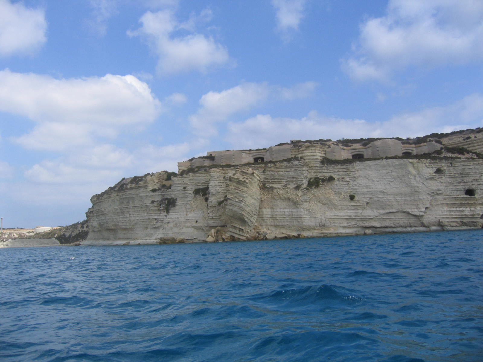 Fort Delimara From Marsaxlokk Bay.